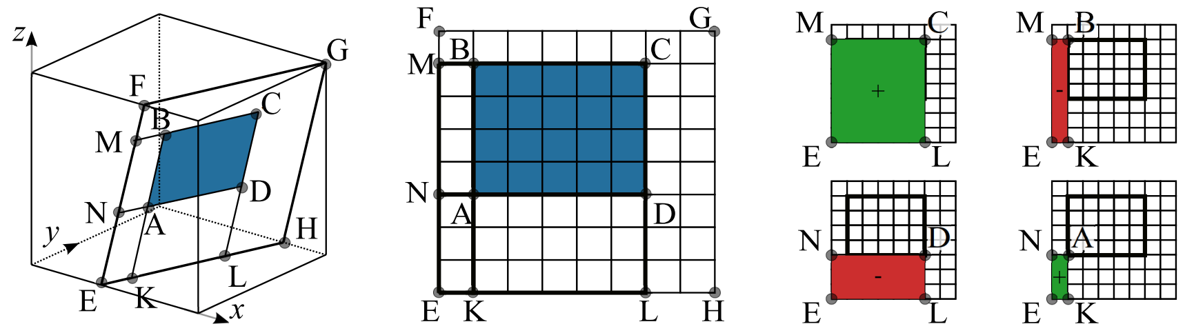 Пример получения дискретного четырехугольника произвольного положения через четырехуголники посчитанные БПХ .